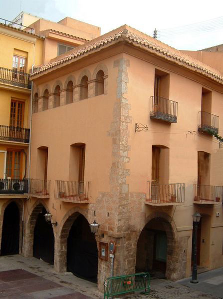 Hostal del Rei (Vila-real)